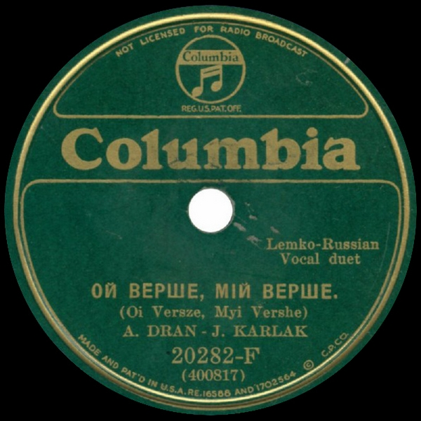 Обкладинка платівки OI VERSHE, MYI VERSHE Duet A. DRAN - J. KARLAK (Okeh-400817)